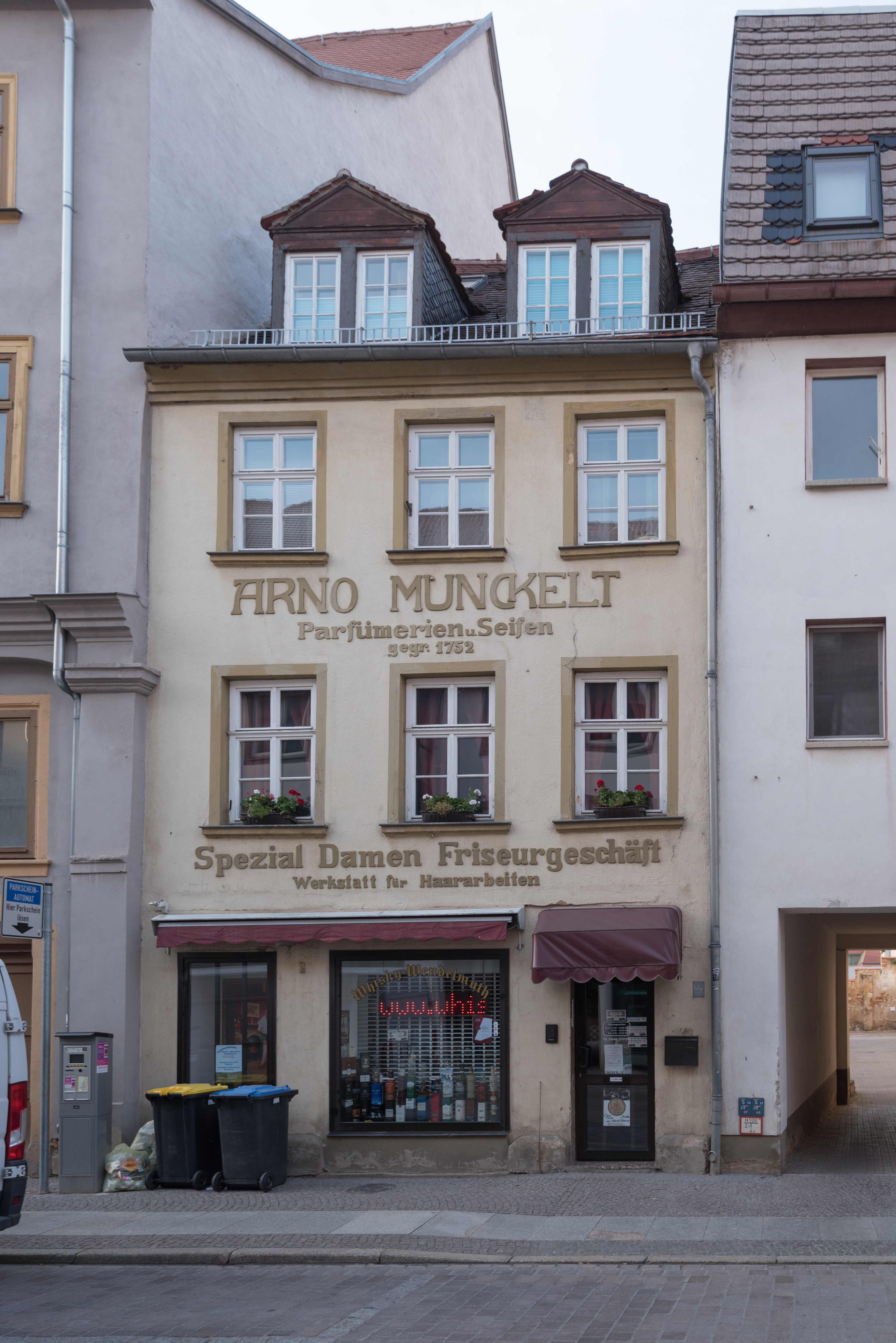 Naumburg (Saale), Marienstraße 33